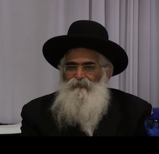 הרב יורם אברג'ל ראש מוסדות "קול רינה רב פעלים"